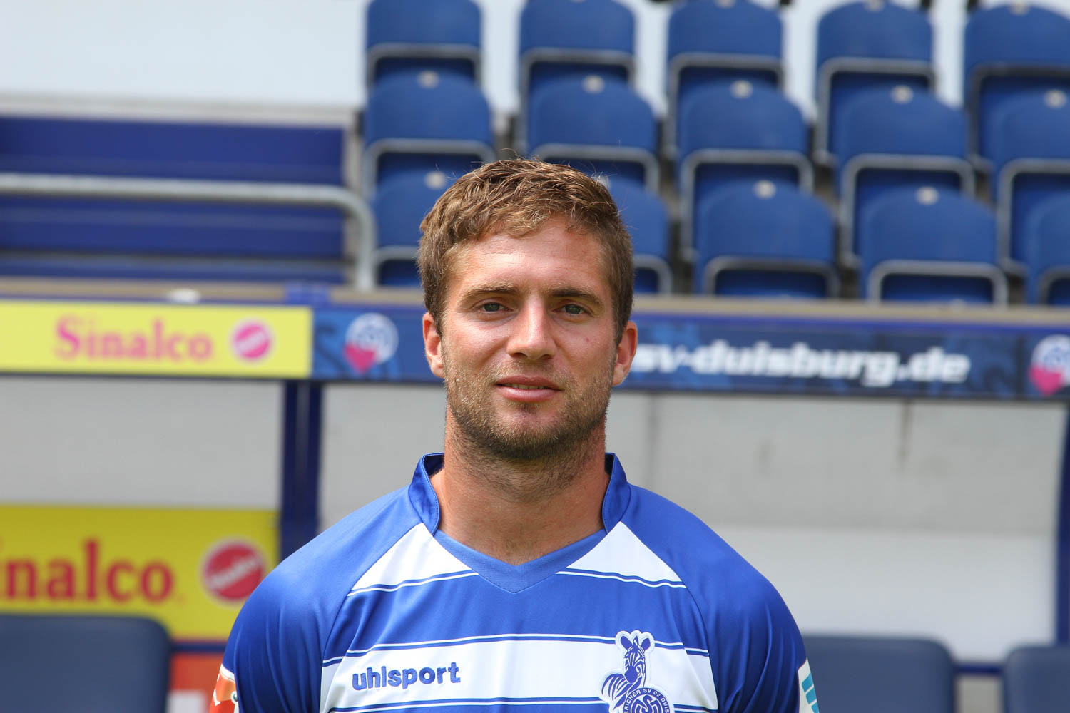 Nico Klotz 2015